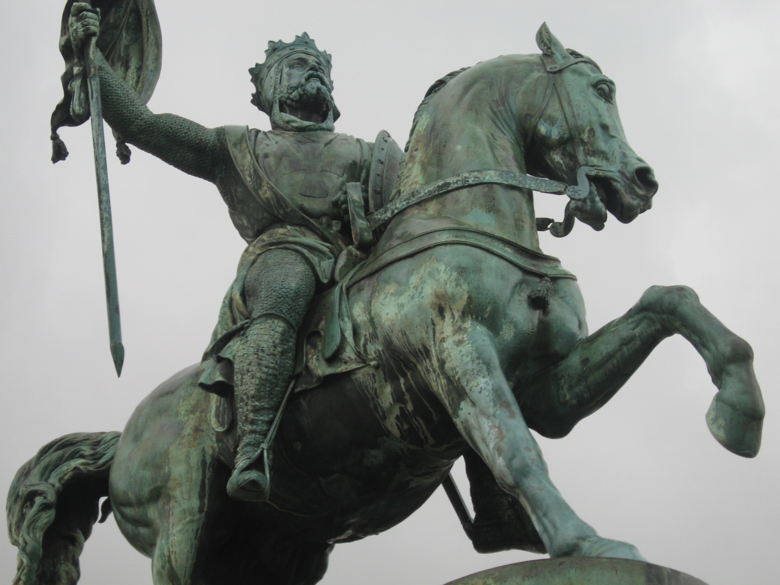 Statue of Godfrey of Bouillon in Brussels Статуя Годфрида Бульонского в Брюсселе